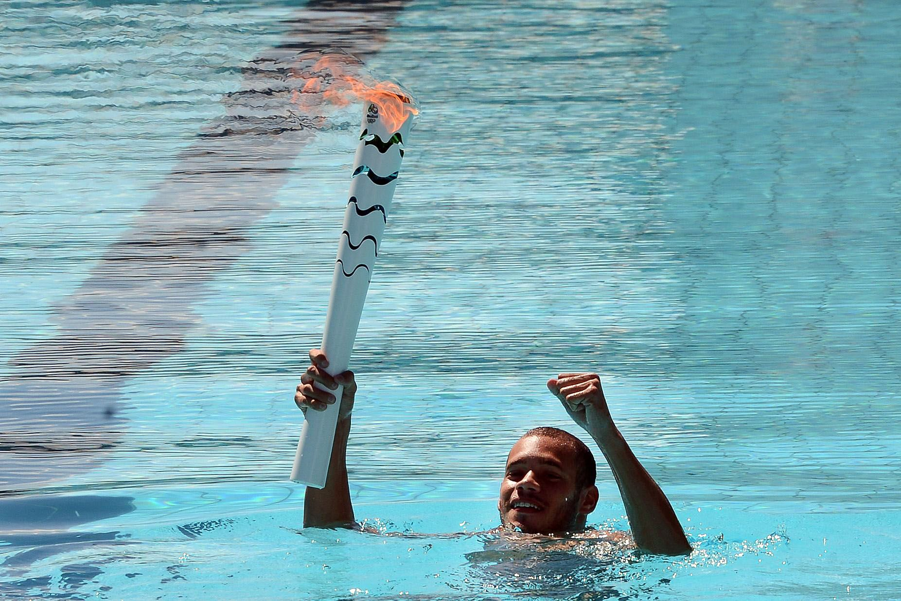 Brasília - Passagem da Tocha Olímpica pelo Complexo Aquático Claudio Coutinho